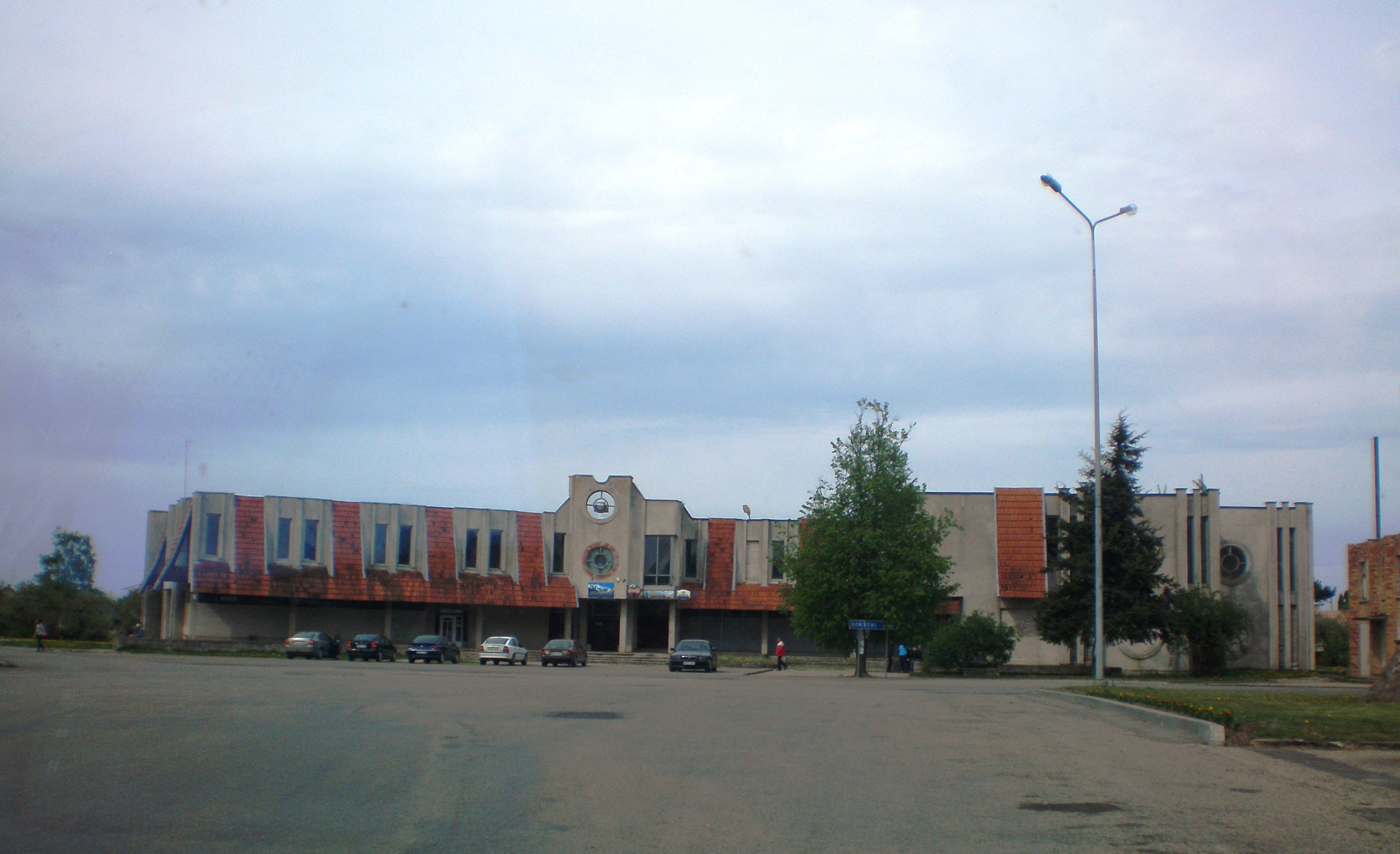 Centro de Krakės, Lituania